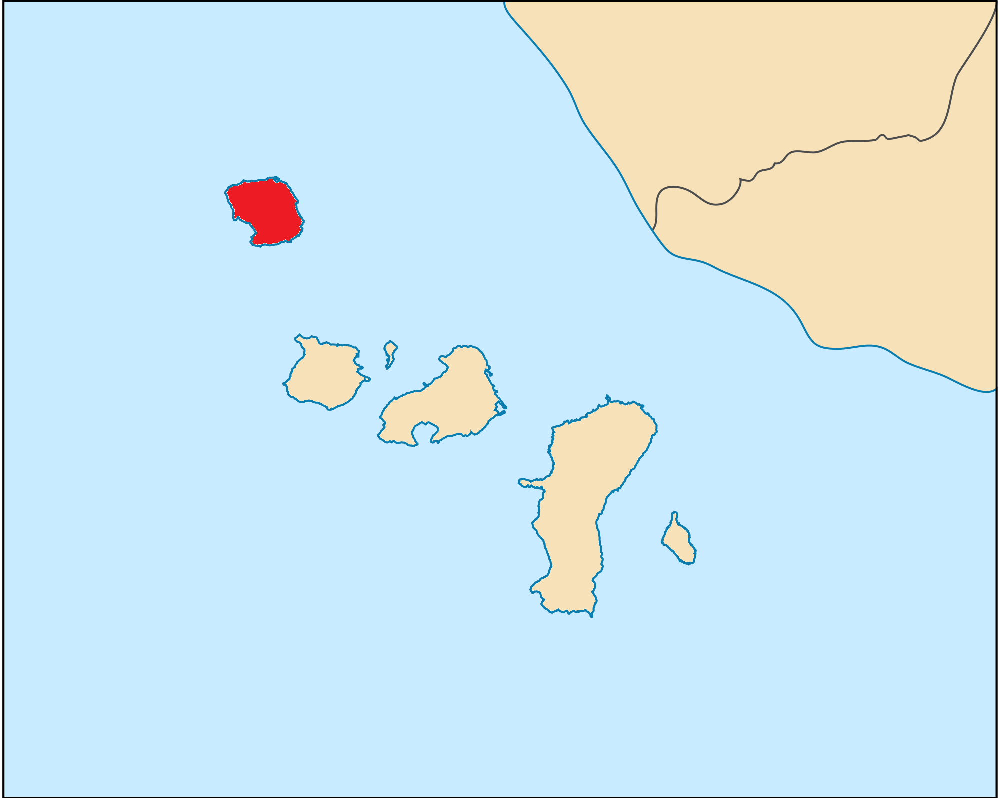 Kınalıada'nın konumu